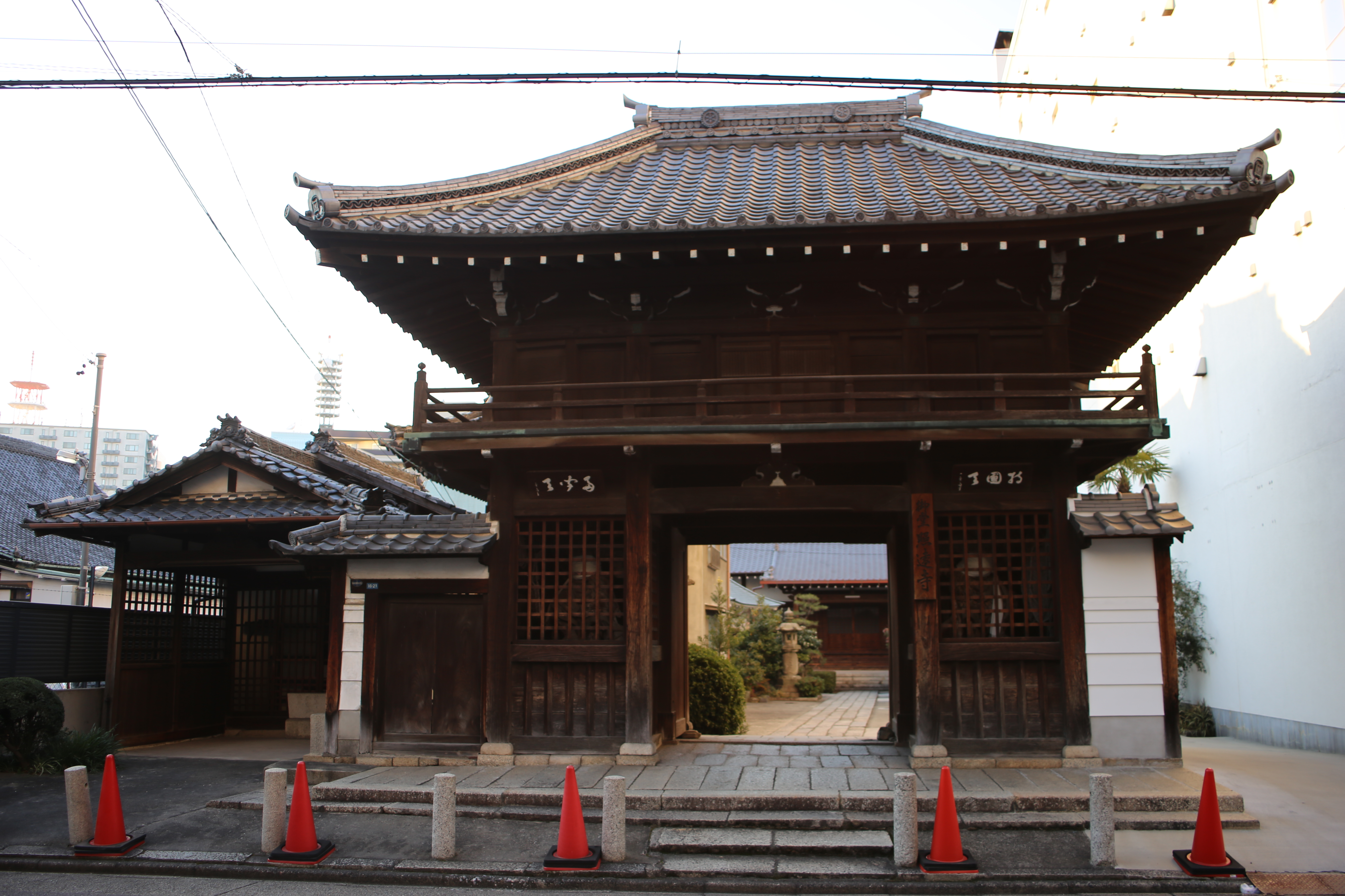 名古屋市東区東桜の照遠寺